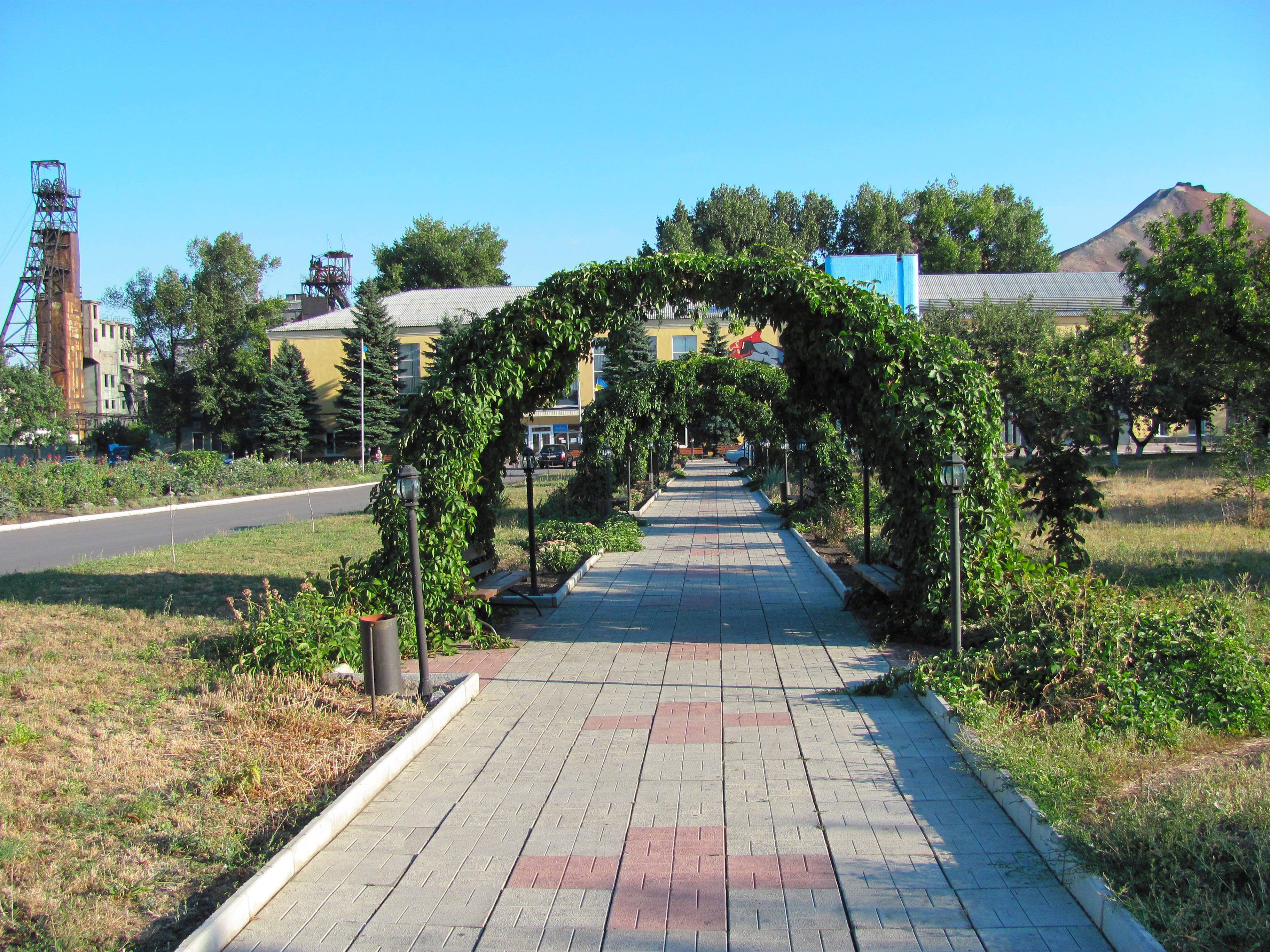 Червонопартизанск